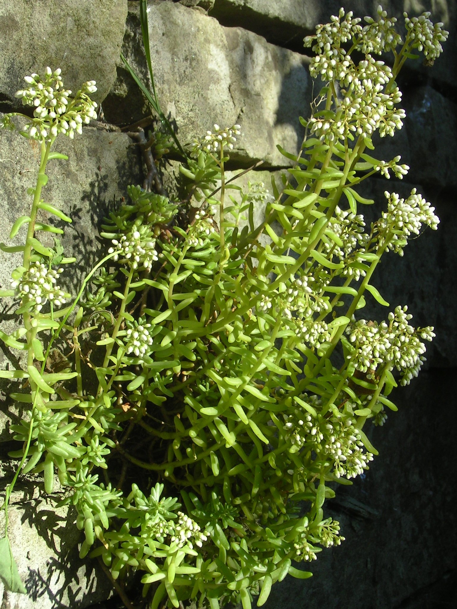 (en) Sedum album (de) Weisser Mauerpfeffer (Sedum album) in den Rillen einer Sandsteinmauer Aufnahmeort: Bearbeitung: keine